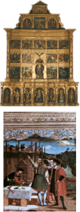 Ororbiako Juan Santuaren erretaula